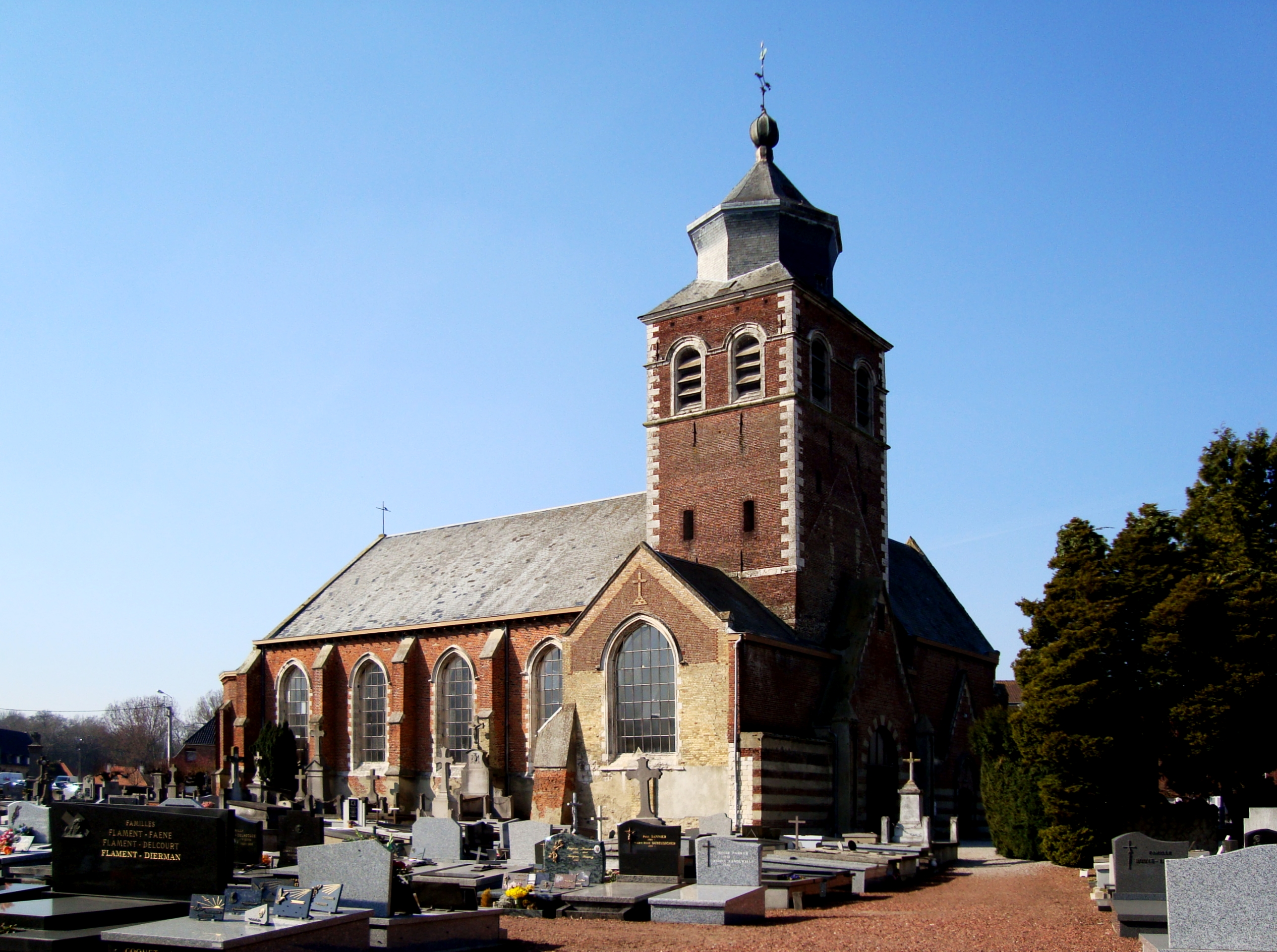 L'église Assomption Notre-Dame de Renescure (Pas-de-Calais). Reconstruite en 1929, ses origines remontent au 12ème siècle. Le capuchon du clocher date du 17ème siècle.